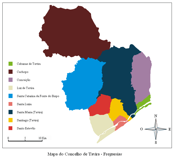 Mapa do concelho de Tavira por freguesias